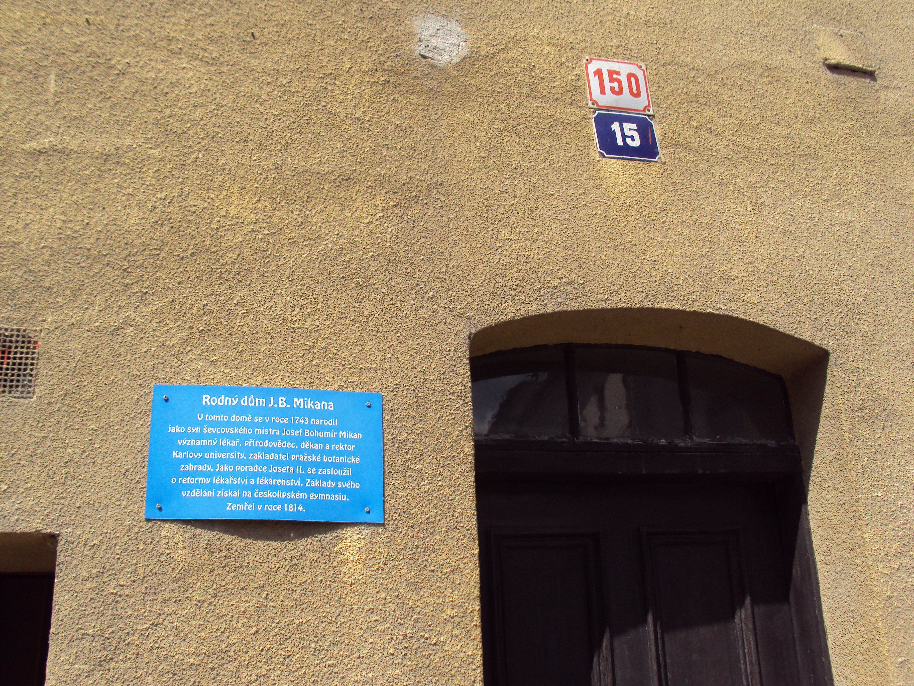 Pamětní deska rektora Karlovy univerzity Josefa Bohumíra Mikana, ulice Prokopa Holého v České Lípě